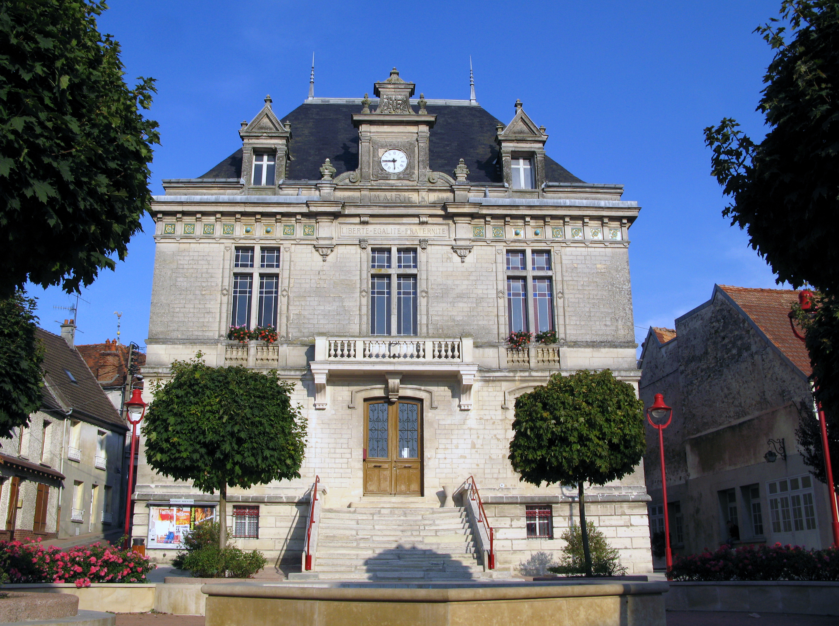 Neuilly-Saint-Front (Aisne, France) - La mairie. . .